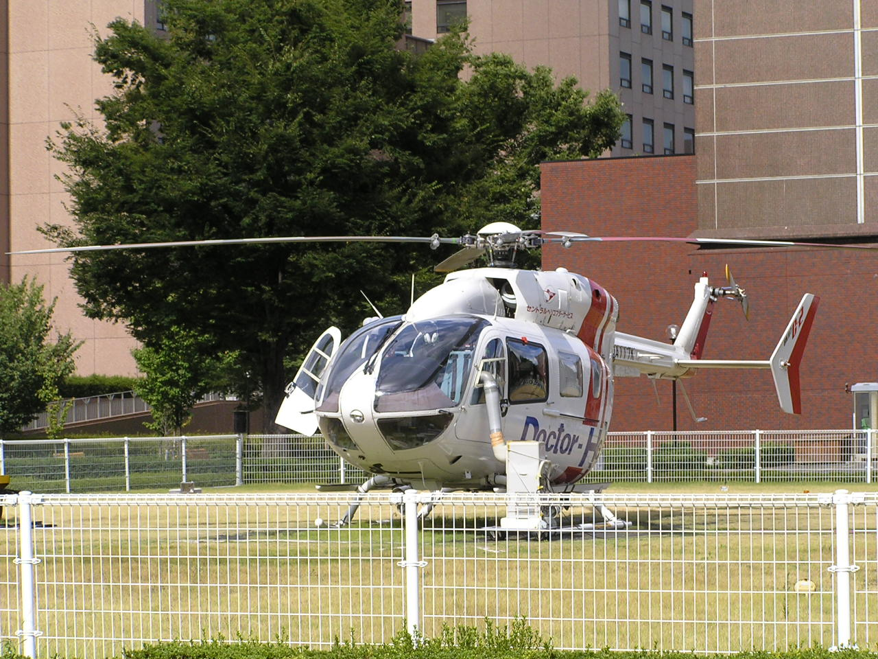 doctor heli 1